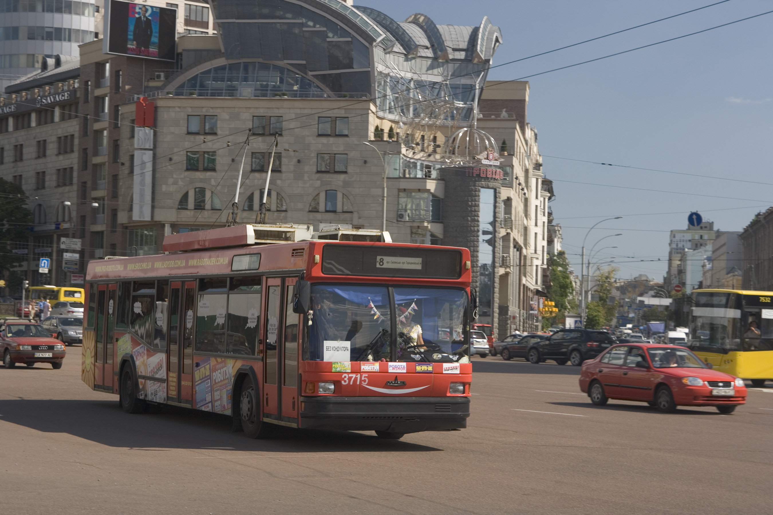 Київський тролейбус